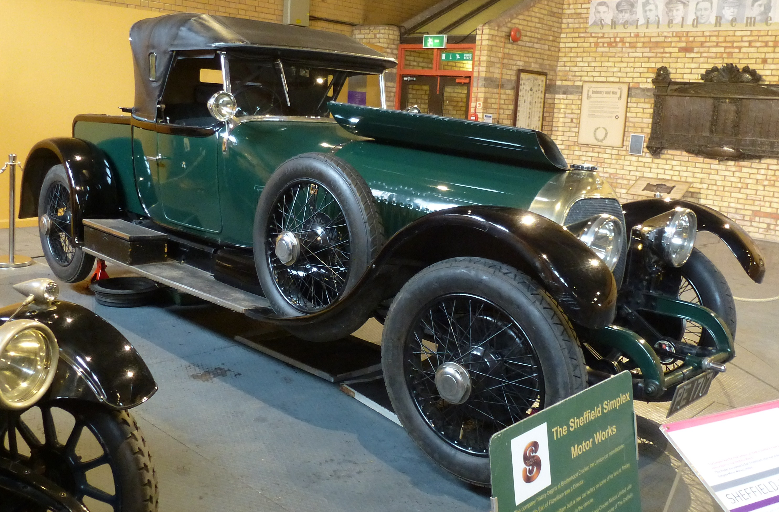 Sheffield-Simplex 50 HP 1920